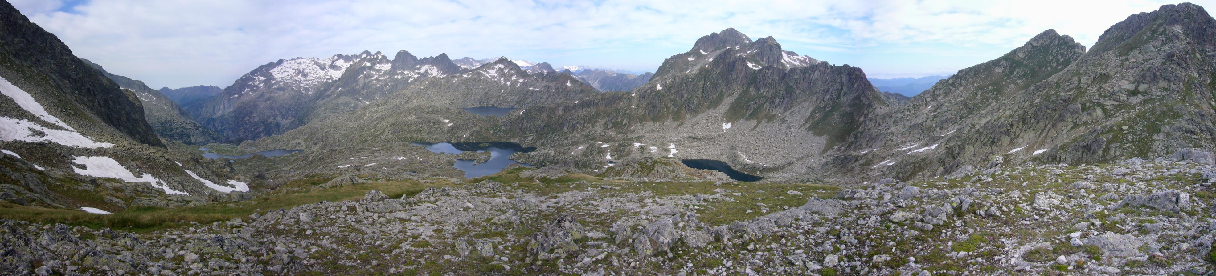 Capçalera de Caldes vista des del Port de Caldes; la Vall de Boí, Alta Ribagorça, Catalunya